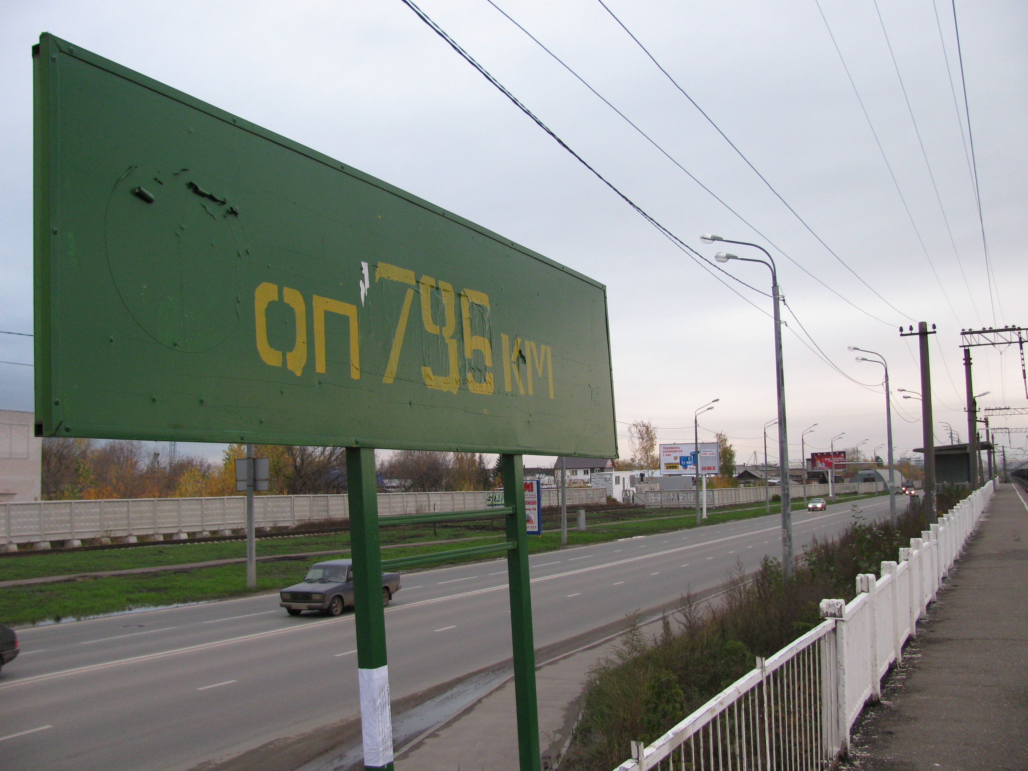 Табличка оп 795